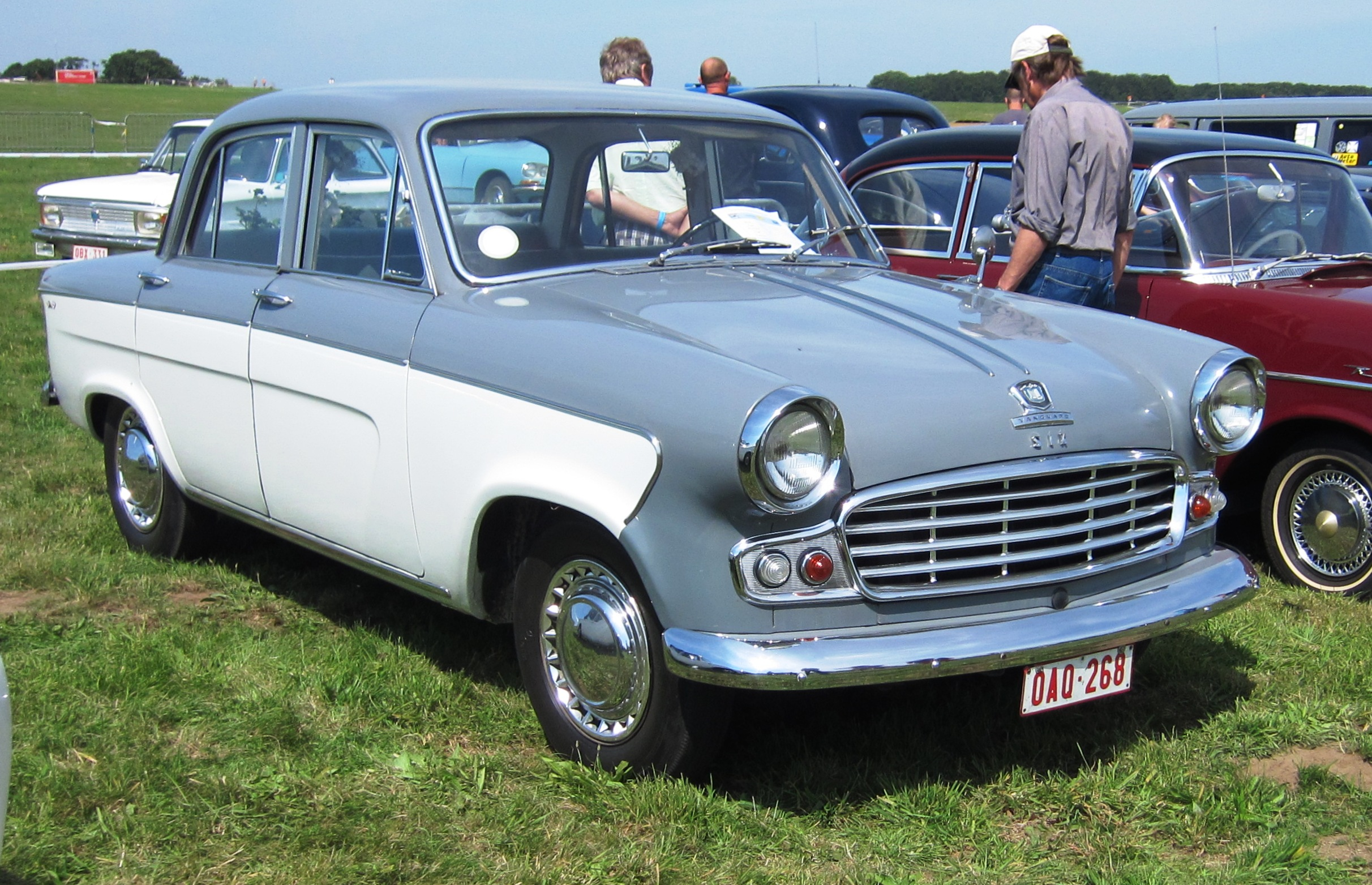 Standard Vanguard Six